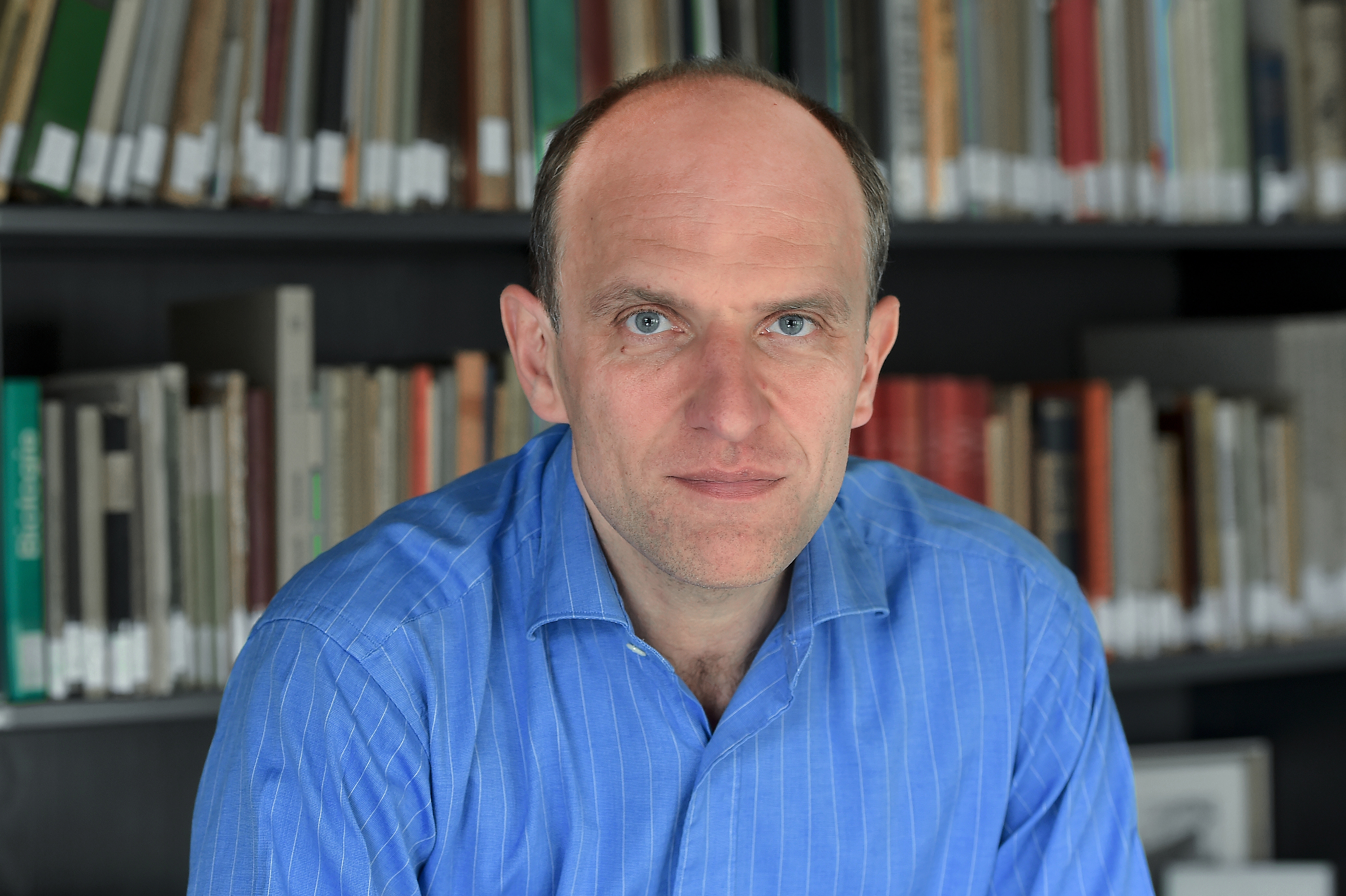 Prof. Dr. Uwe Hoßfeld, Institusdirektor Arbeitsgruppe Biologiedidaktik an der Friedrich-Schiller-Universität Jena. Foto: Jürgen Scheere